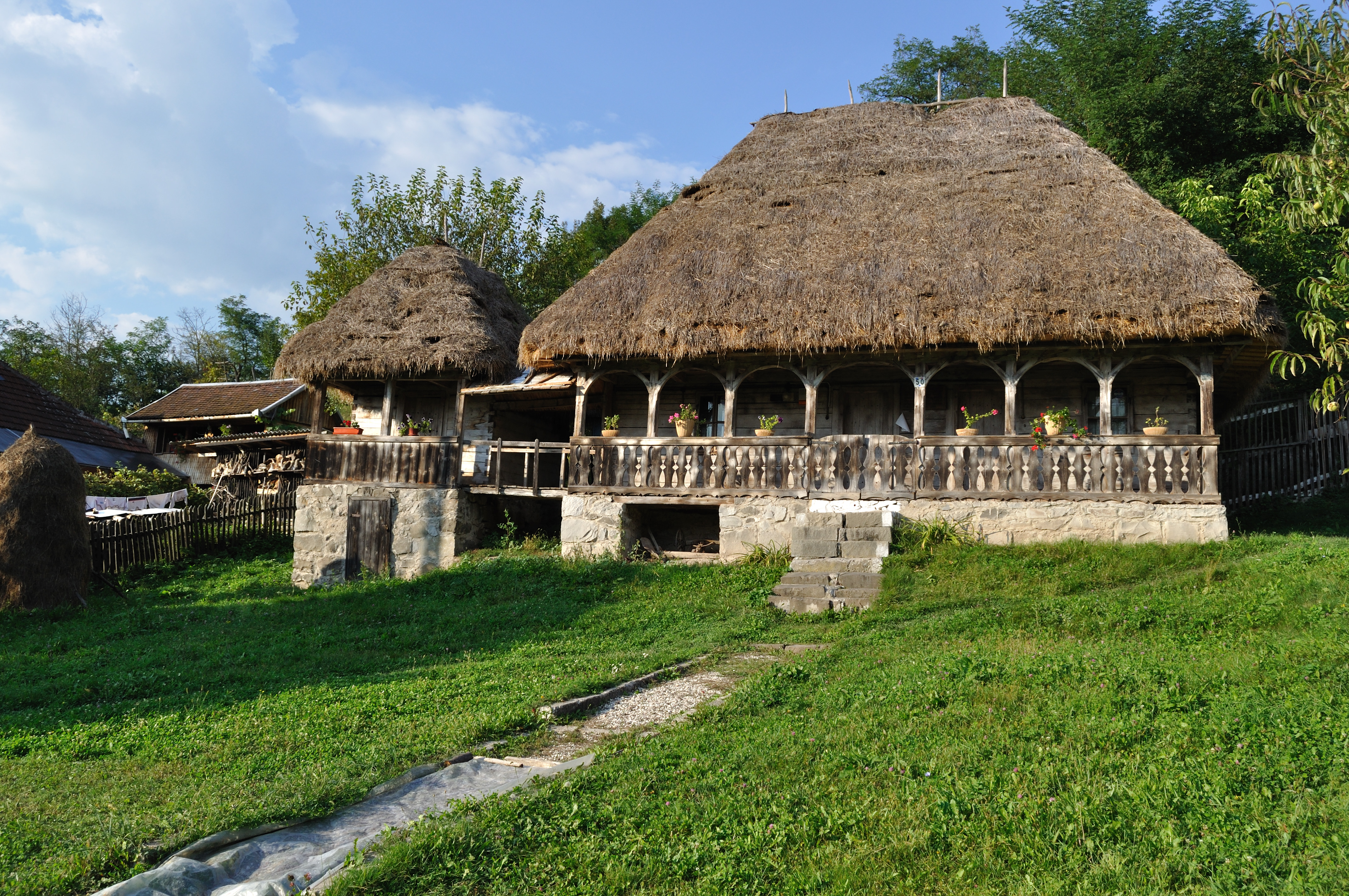 Casa natală Crişan (Marcu Giurgiu)